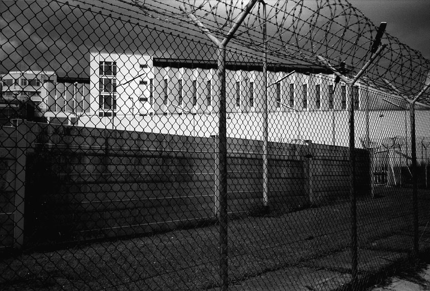 Titel: Stammheim Zyklus, Ralph Ueltzhoeffer, Schwarz-Weiß Fotografie, Handabzug und Mehrfachbelichtung. Stuttgart Stammheim Vollzugsanstalt RAF (1997).